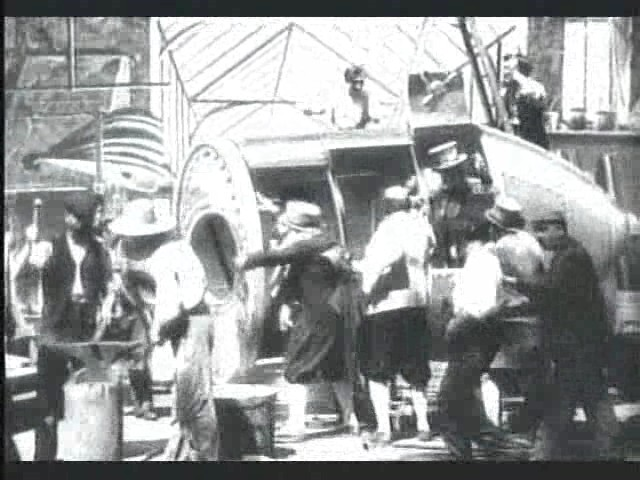 Méliès, viaggio nella luna (1902) 02